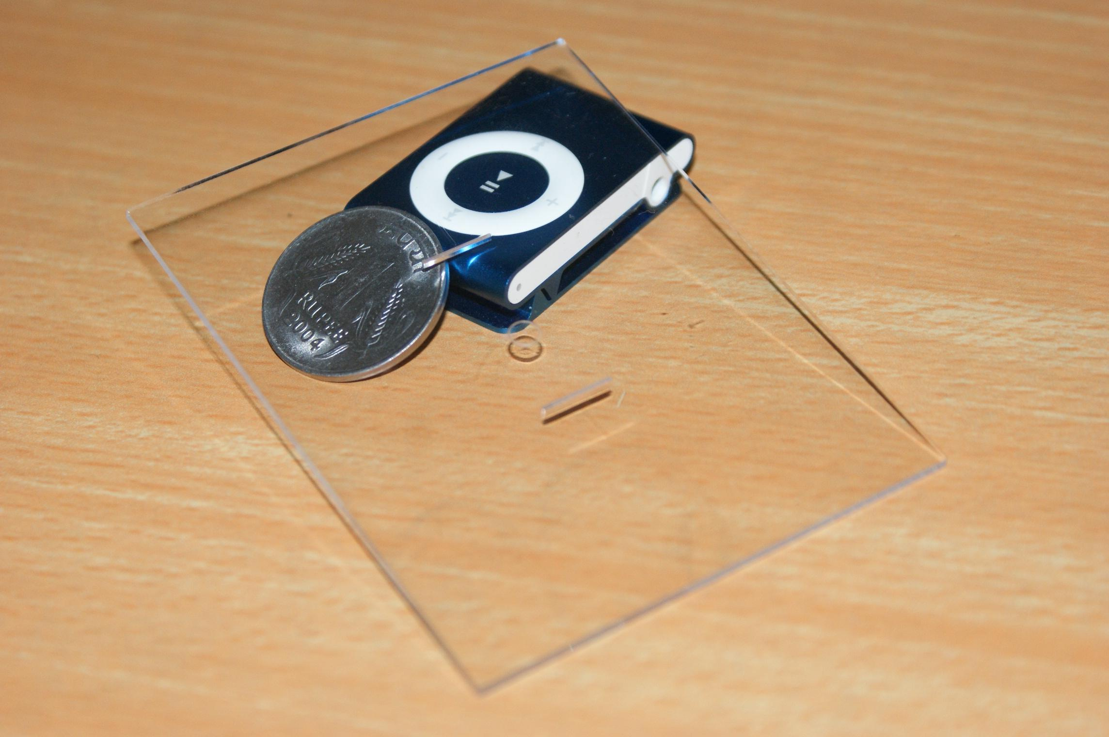 സ്ഫടികം, ഒരു രൂപ നാണയം വ്യക്തമായി ഇതിലൂടെ കാണുവാൻ കഴിയുന്നു. (പ്രകാശത്തെ കടത്തിവിടുന്നു)